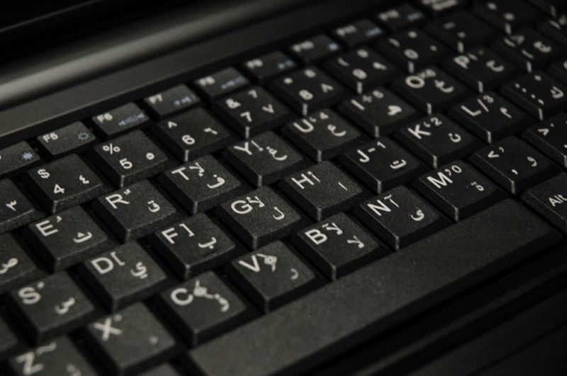 Blick auf eine arabische Tastatur